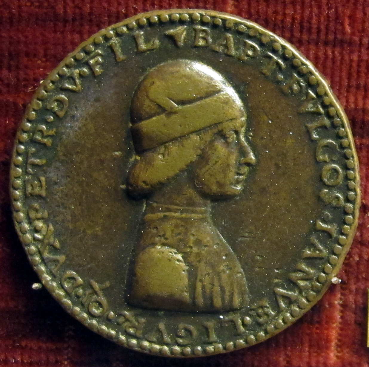 medaglia di battista II di campofregoso, doge di genova nel 1478-83